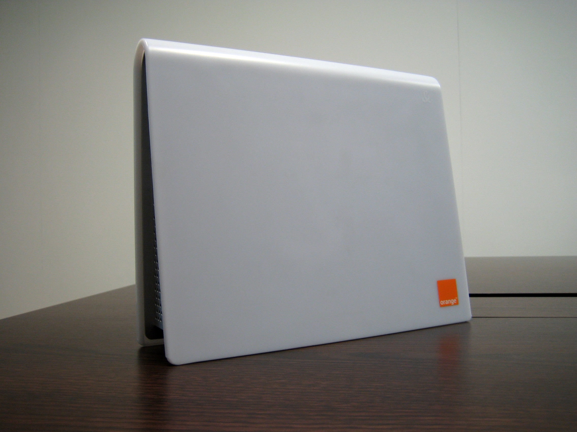 livebix Inventel 1.1